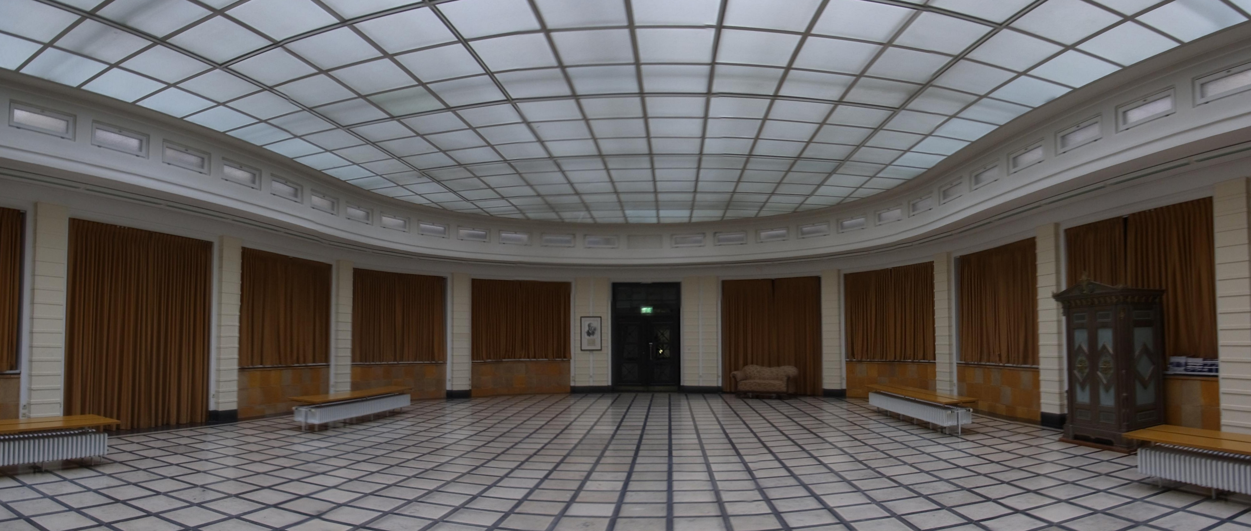 DIe ehem. Kassenhalle wurde zu Ehren des ehem. Staatsrates Leo Lippmann benannt.